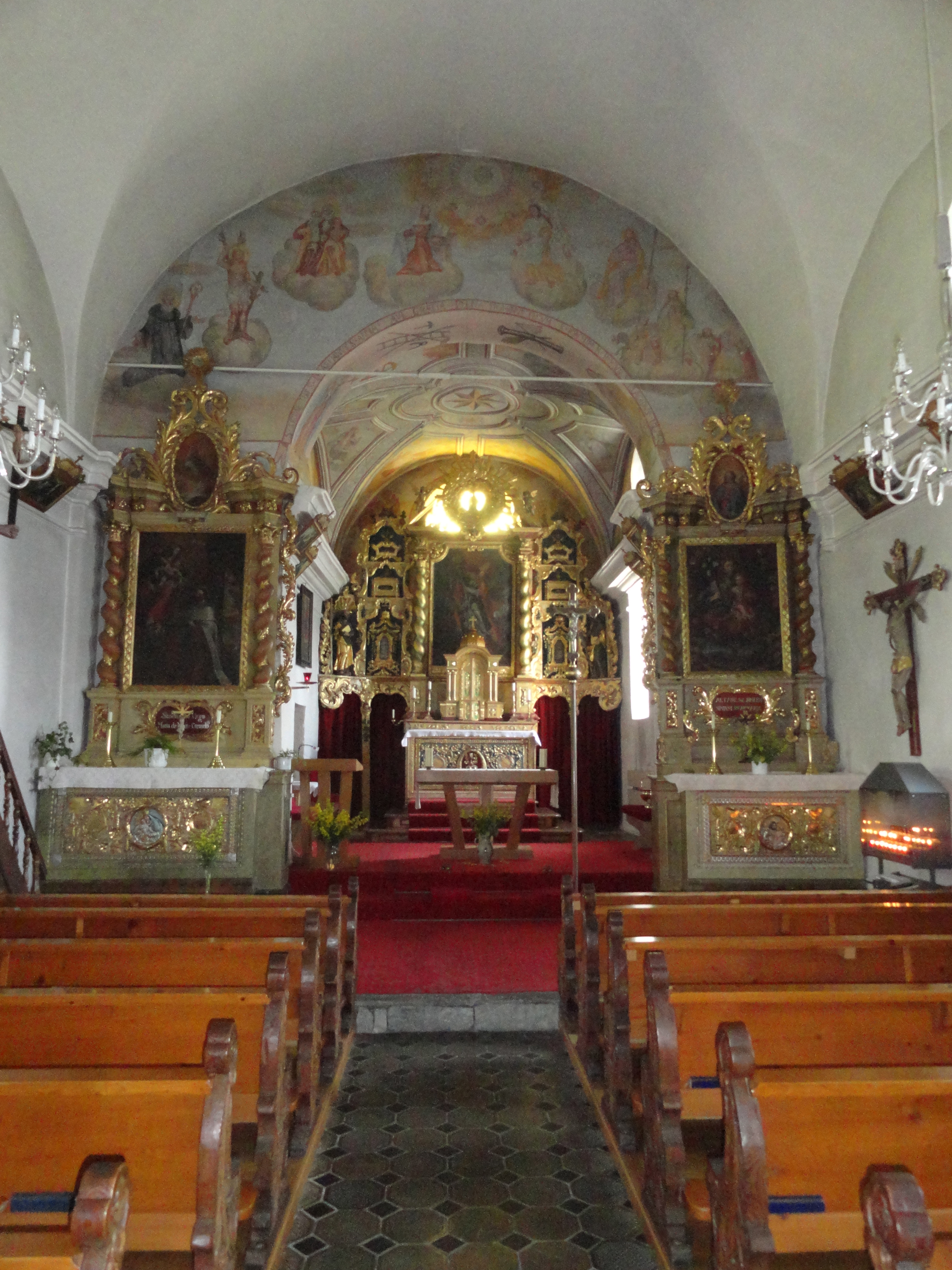 Katholische Pfarrkirche St. Zeno in Ladir: Innenraum